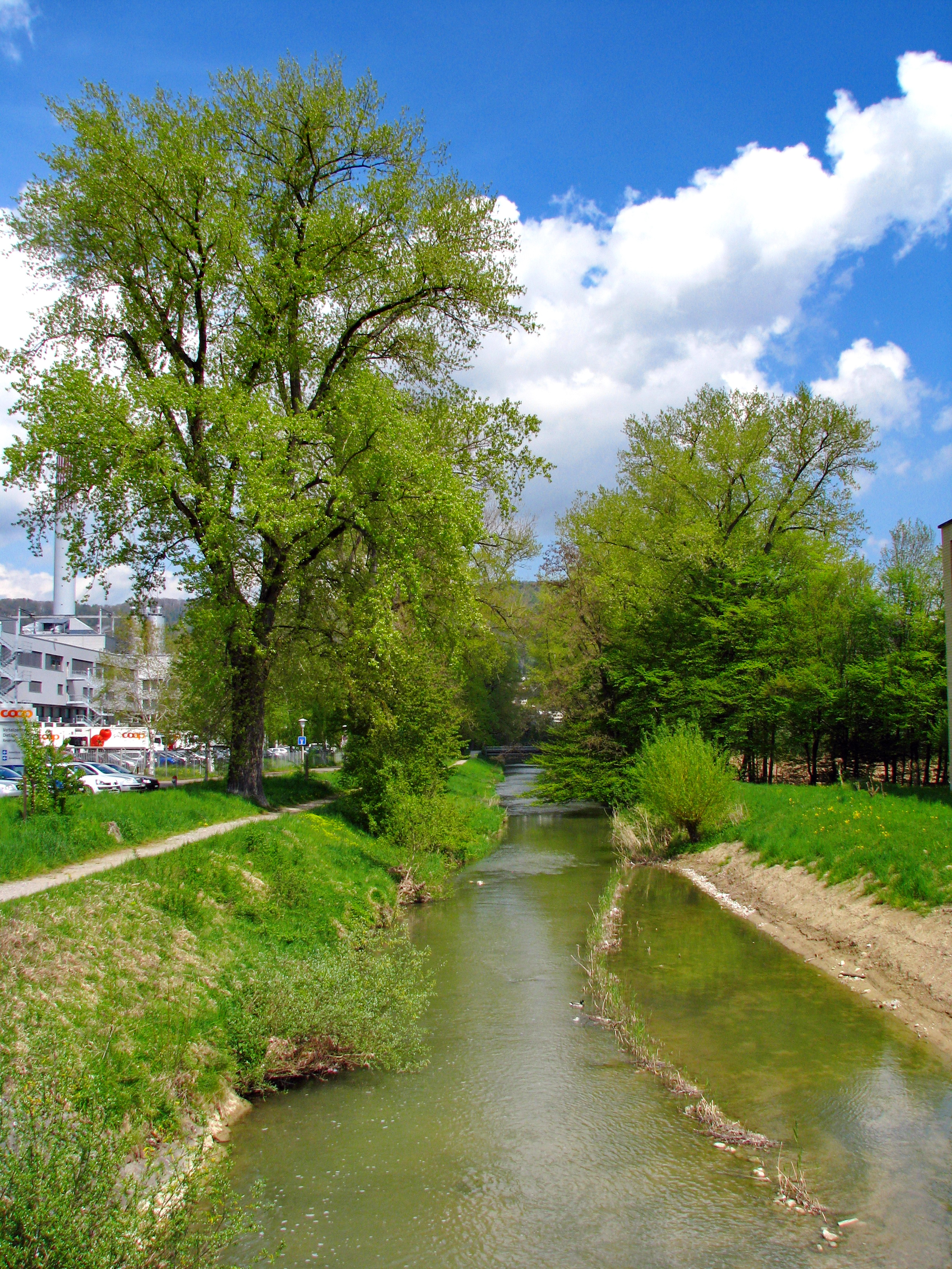 Reppisch in Dietikon (Switzerland)